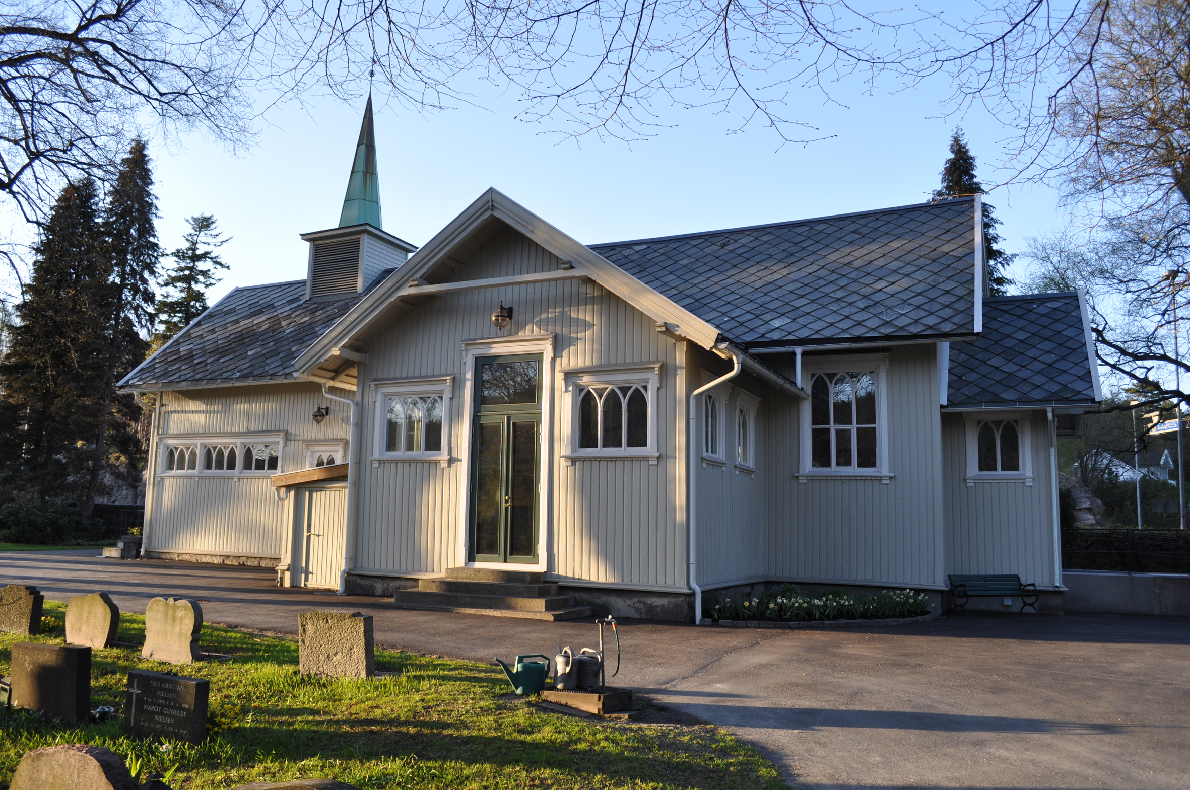 Norsk (bokmål): Kristiansand kirkegård